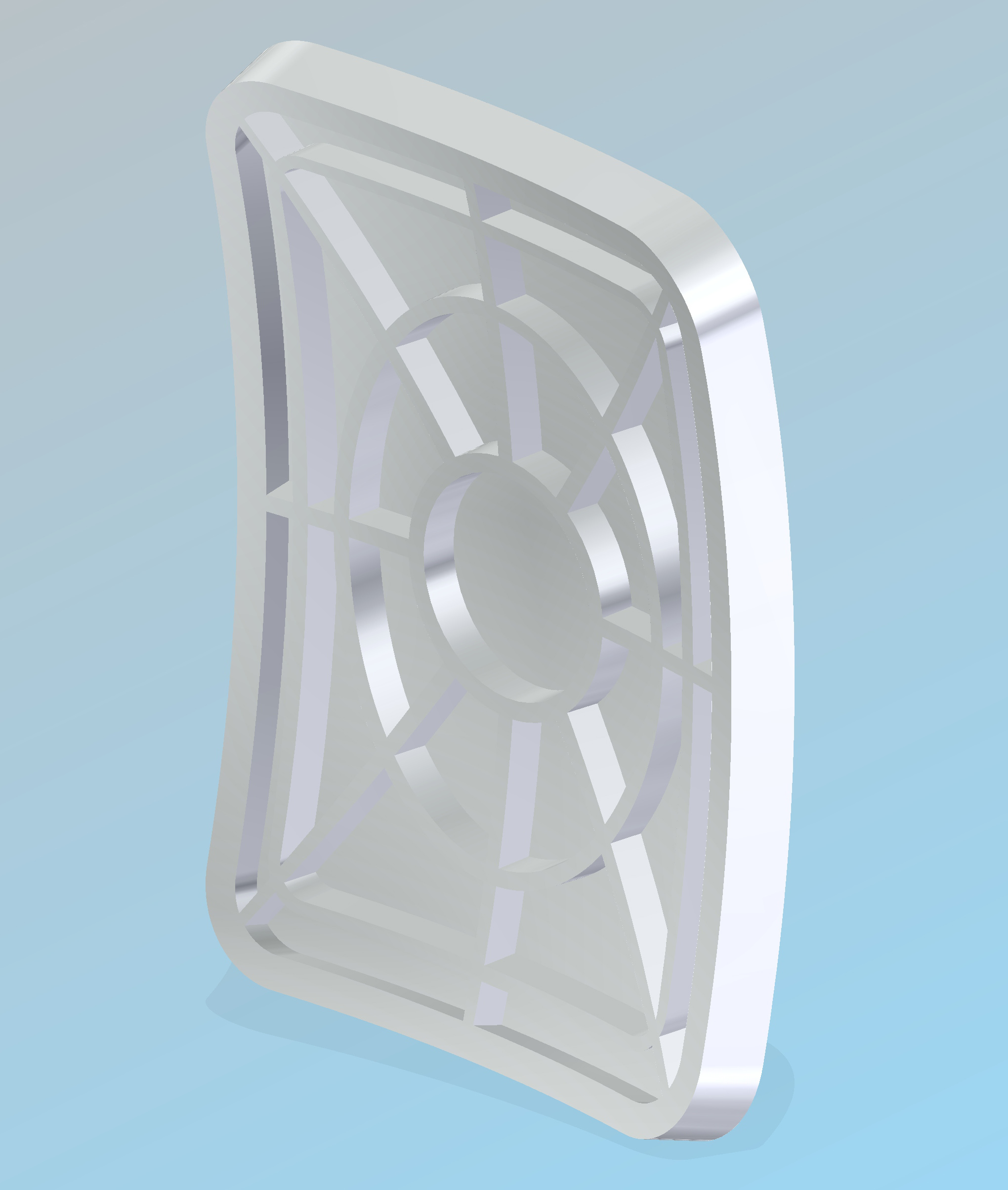 Posible compuerta realizada mediante fresado químico.